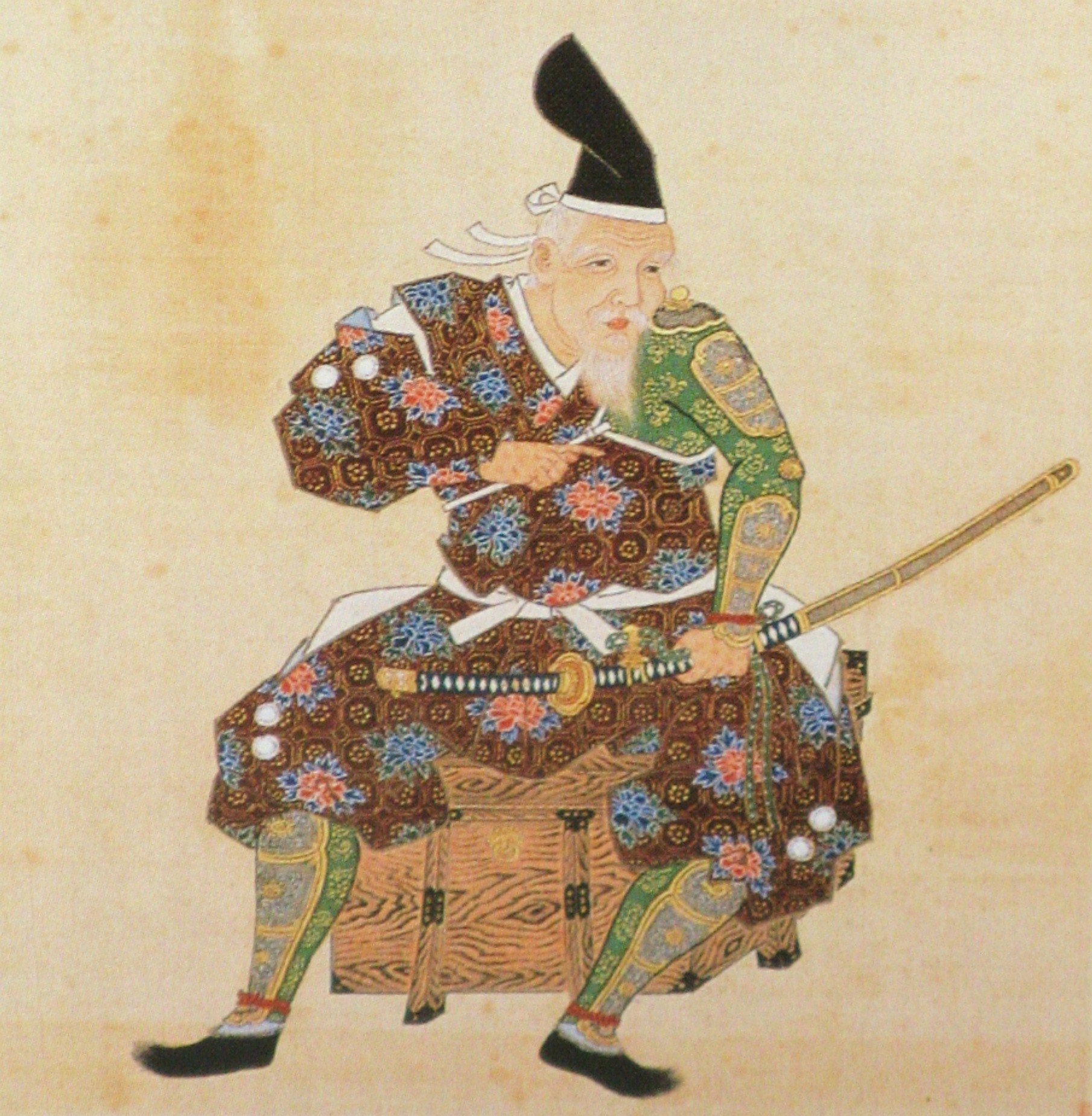 仙台市博物館所蔵の伊達稙宗肖像。